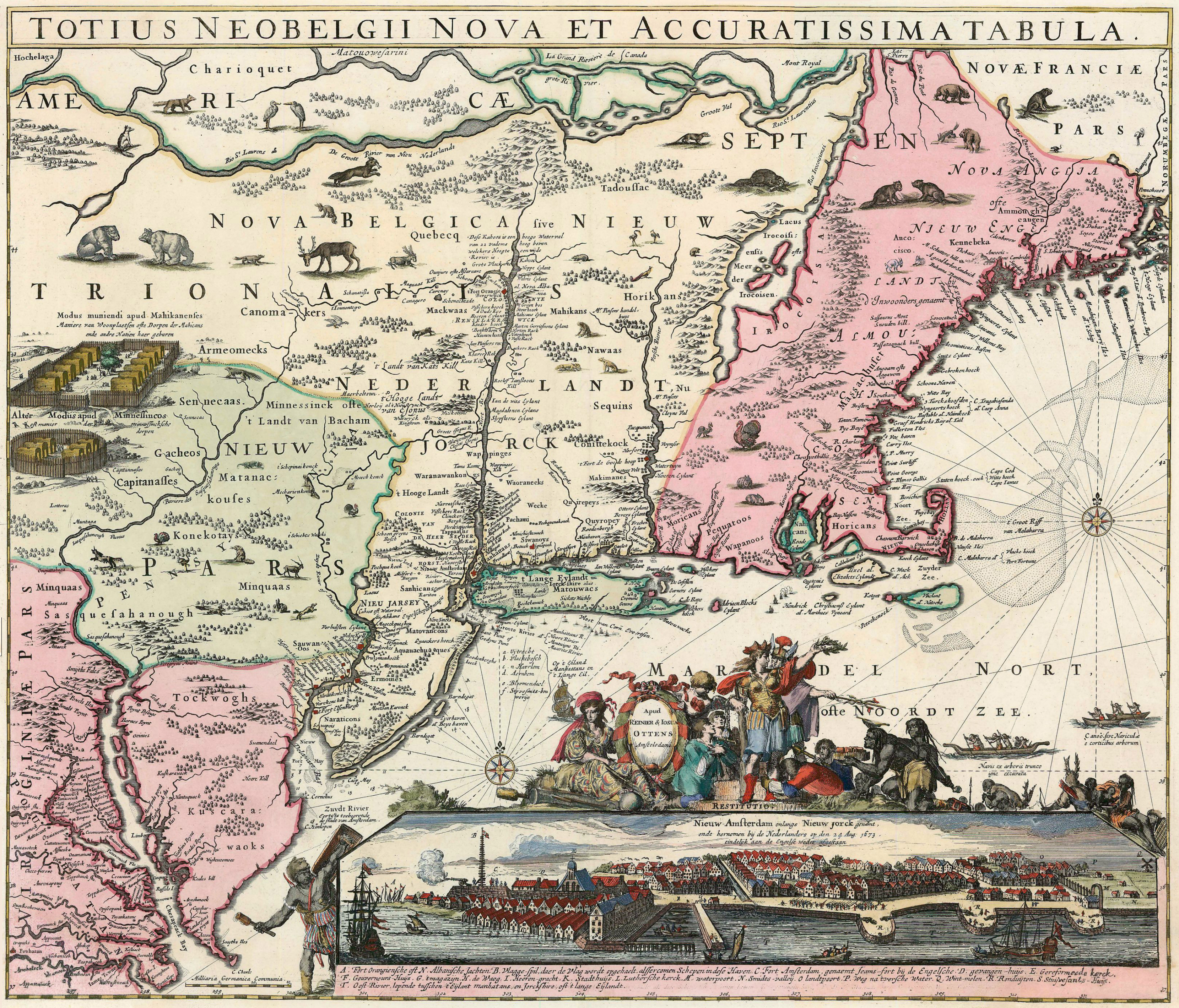 Totius Neobelgii Nova et Accuratissima Tabula 7th state